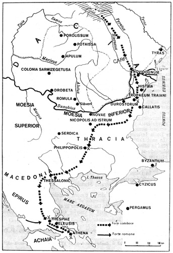 Вторгнення костобоків у Грецію